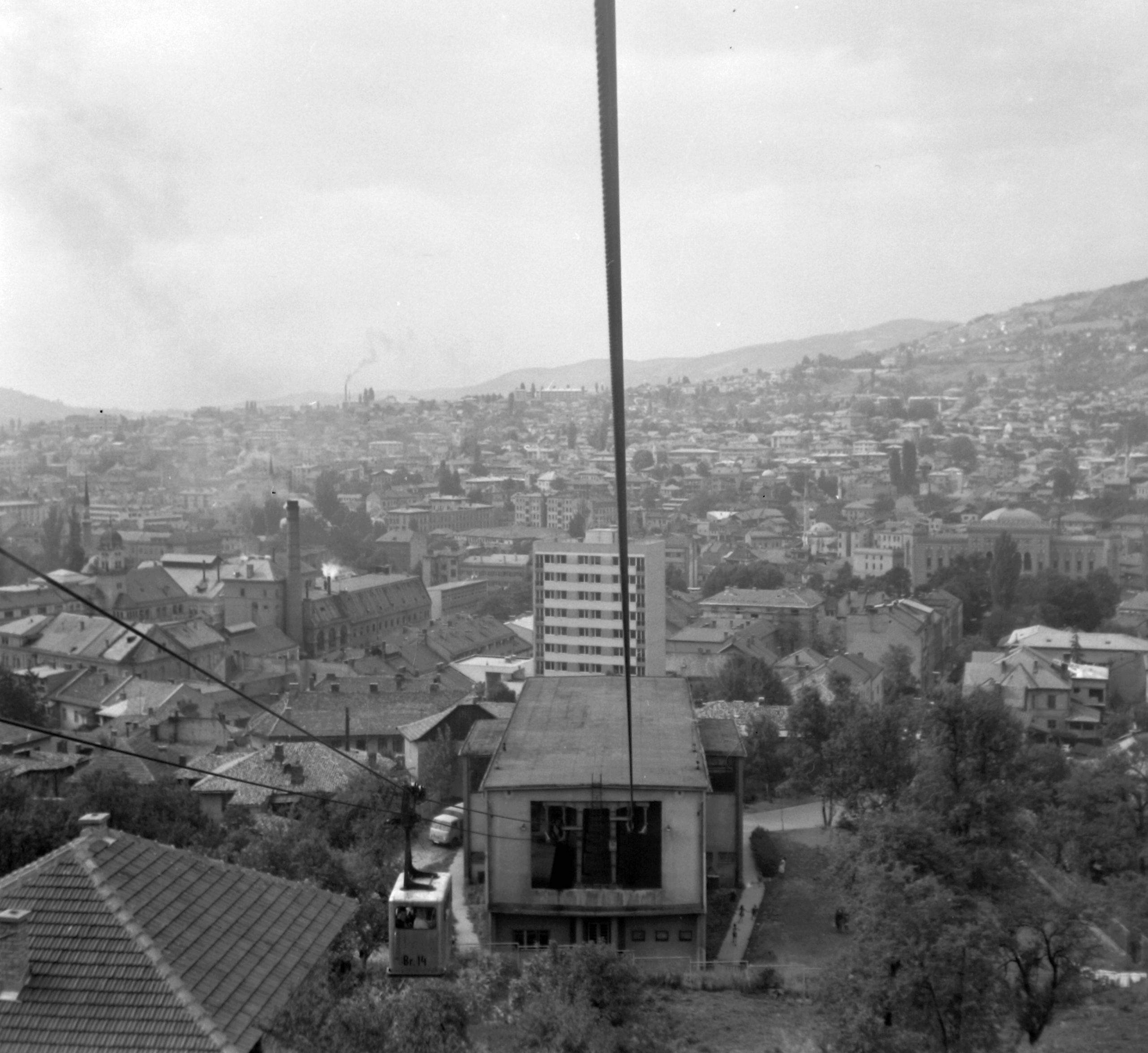 drótkötélpálya. Location: Bosnia and Herzegovina, Sarajevo Tags: Yugoslavia, cableway, cityscape Title: drótkötélpálya.